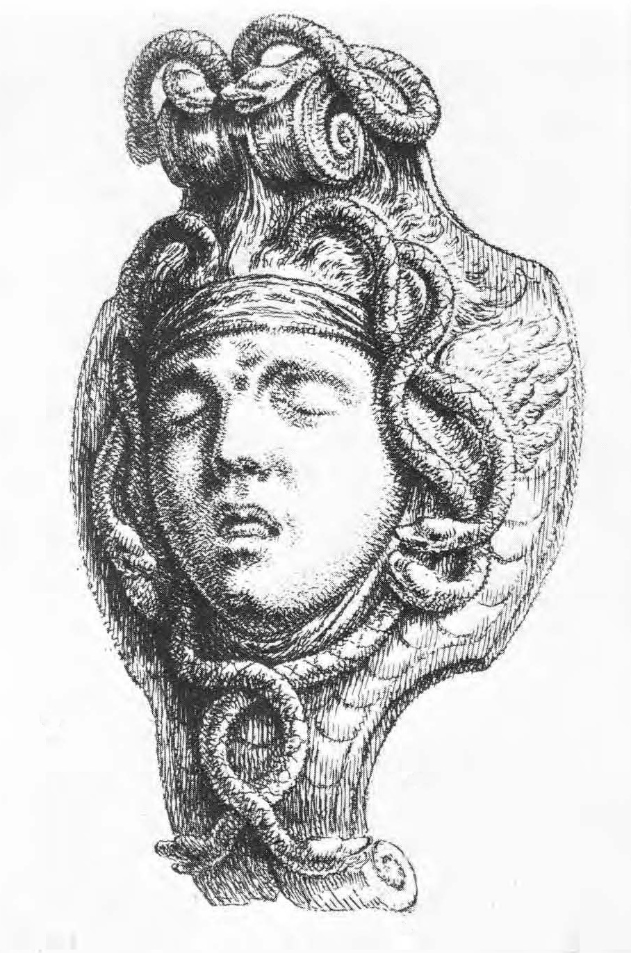 Maske am Zeughaus zu Berlin. Aus dem Werk Larven nach den Modellen des berühmten Schlüters gezeichnet und in Kupfer geätzt von B. Rode, erschienen in "Berlin, im Verlag bei Heinrich Rode" o.J. (um 1759).